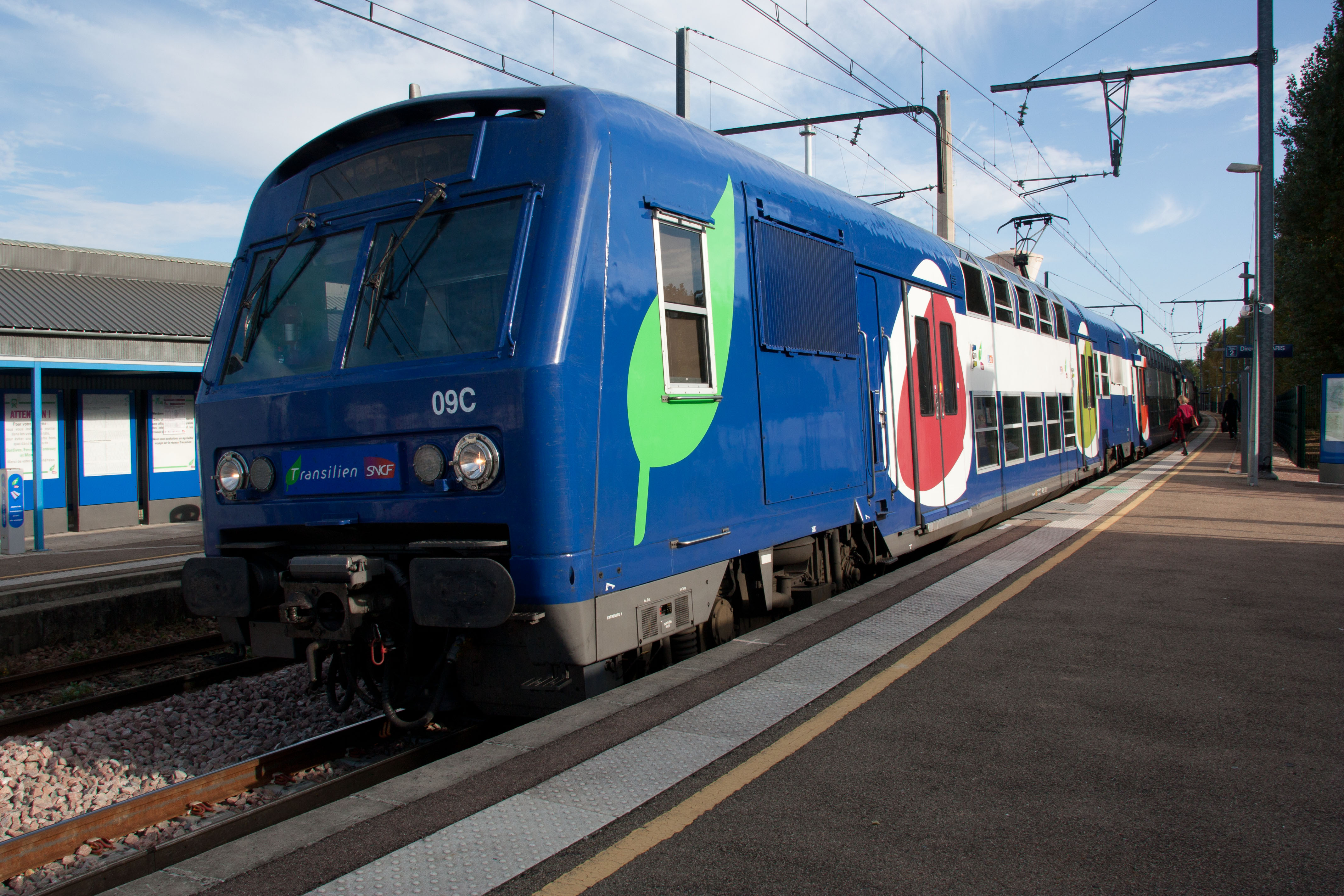 Gare de Bagneaux-sur-Loing, Bagneaux-sur-Loing, Seine-et-Marne, France.